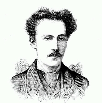 Stepan Grigor'evič Širjaev